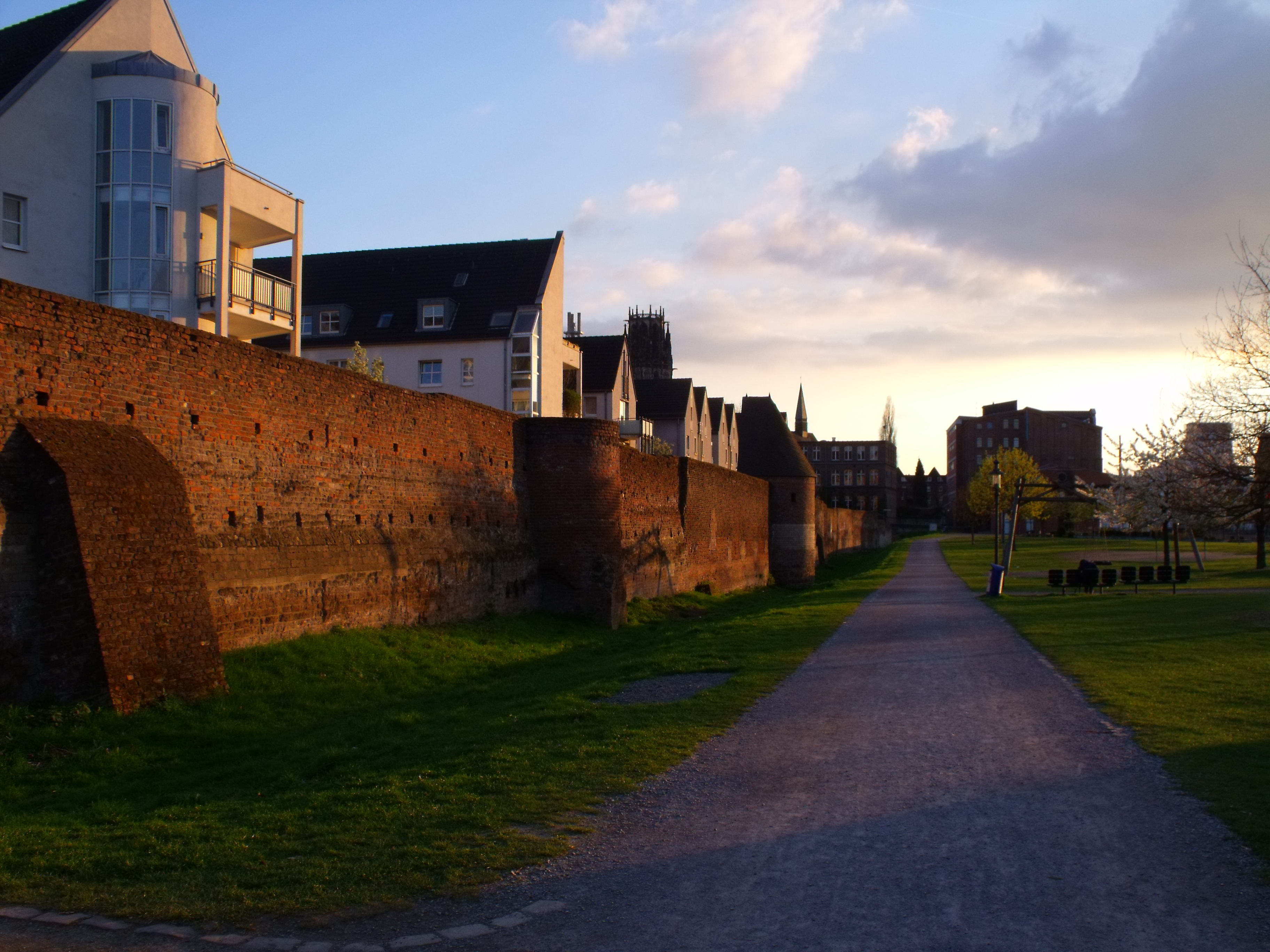 Stadtmauer Duisburg Außenseite